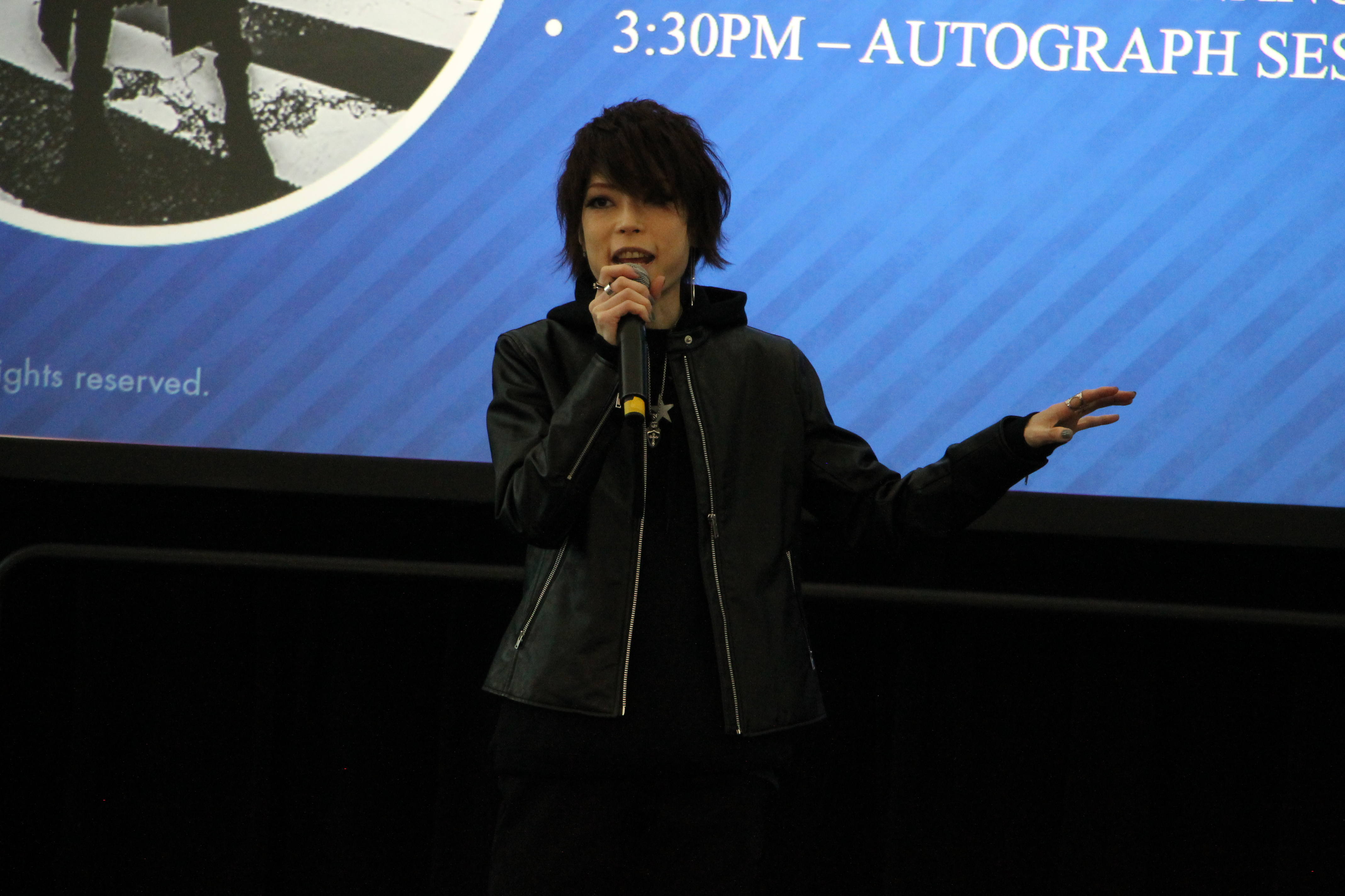 FanimeCon 2018 139